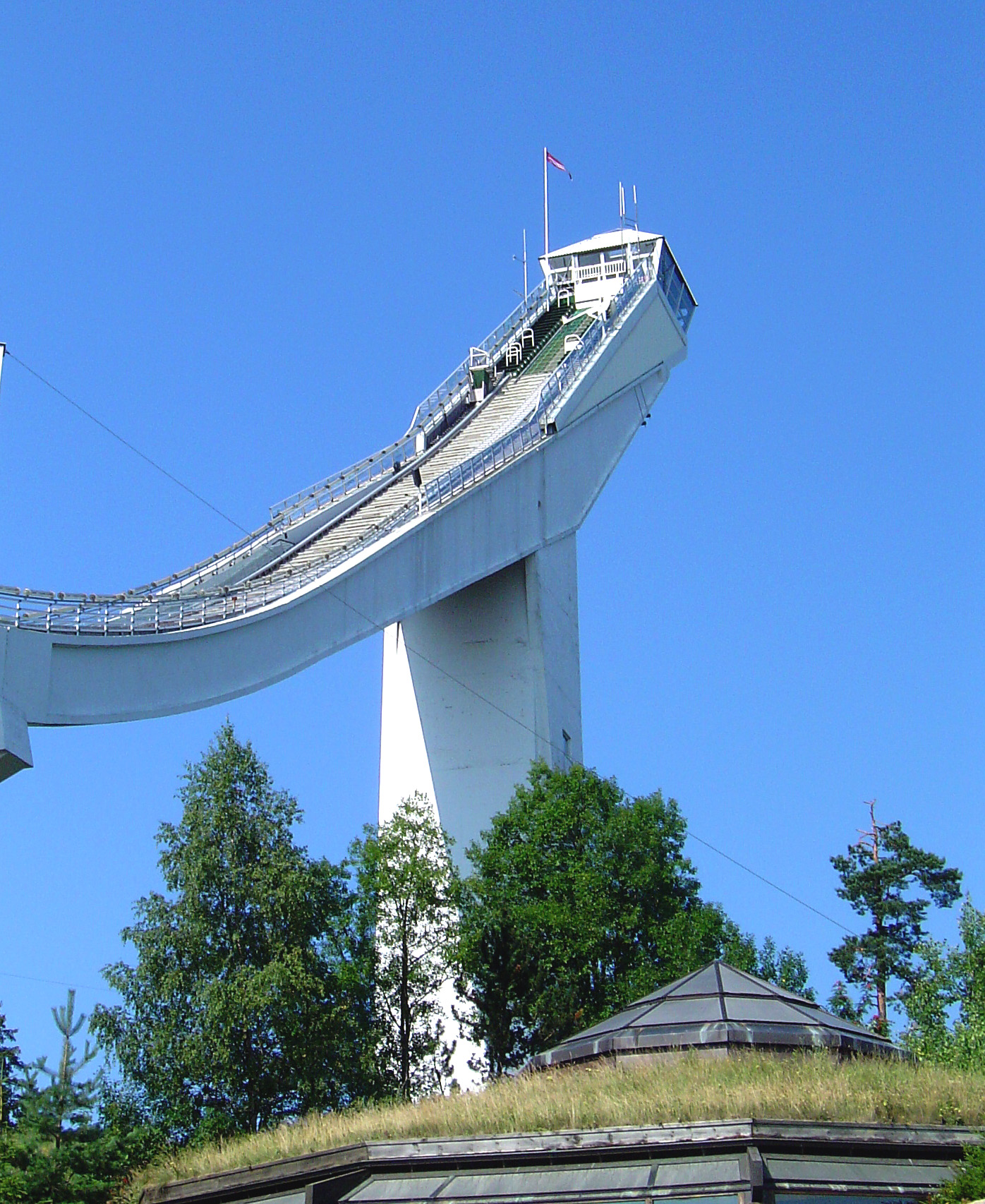 D'Schischanz Holmenkollen